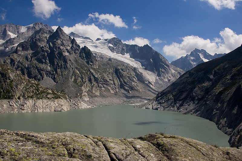 Albigna-Stausee im Bergell